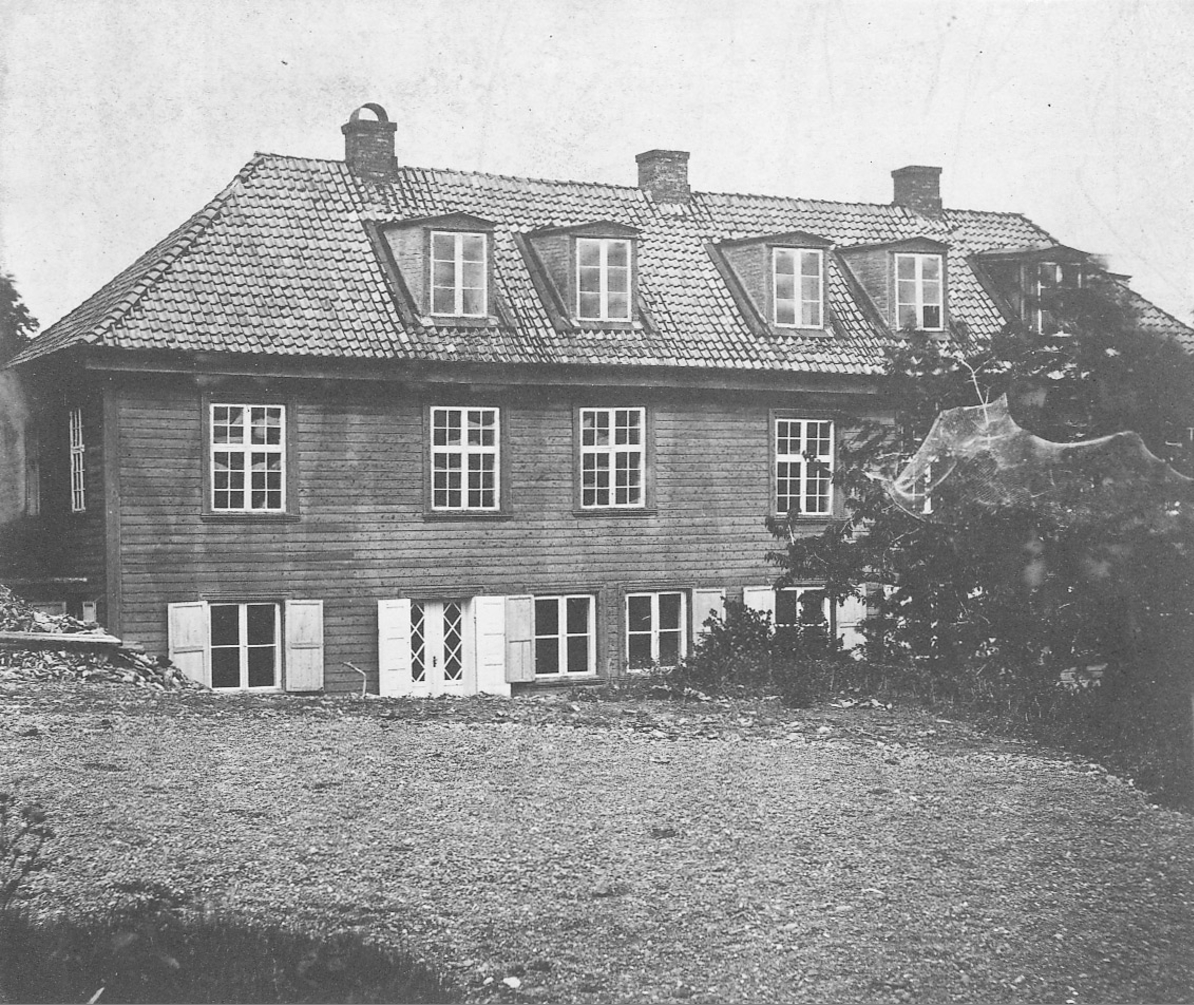 Løkkehus på Filipstad løkke, Munkedamsveien 62, før 1865 (altså før den nåværende, som er tegnet av Georg Bull). Ukjent fotograf. Fra Byhistorisk samling hos Oslo museum.